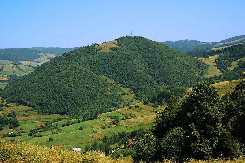 Widok na Jarmutę z Palenicy